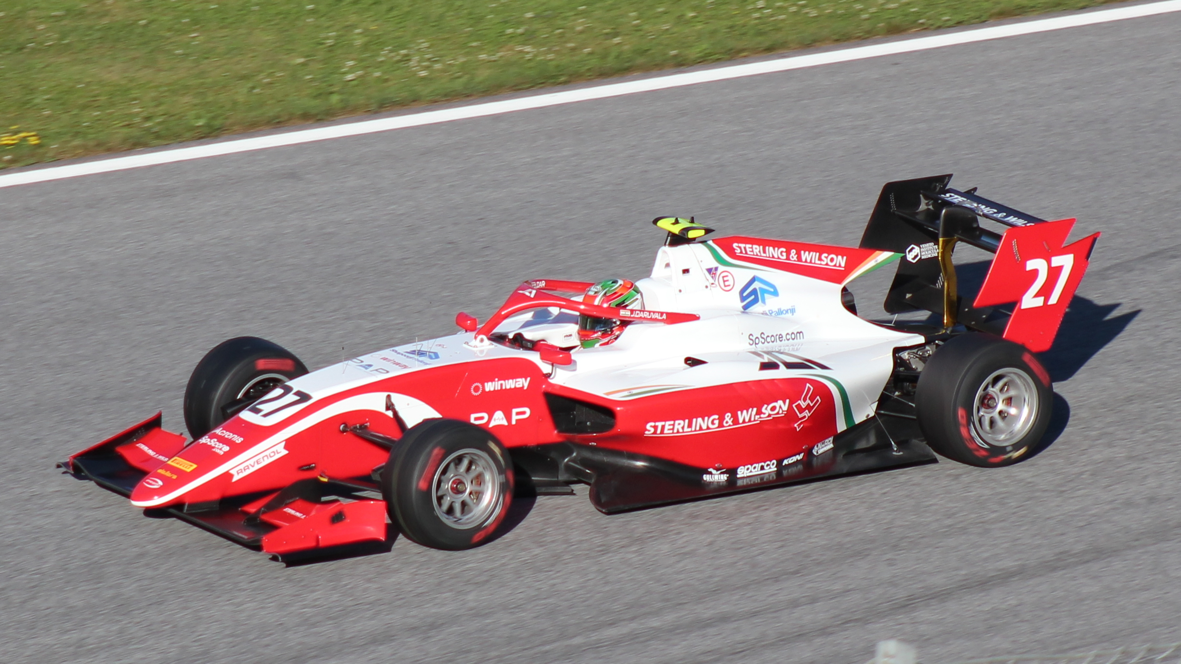 Daruvala beim Rennwochenende in Österreich 2019